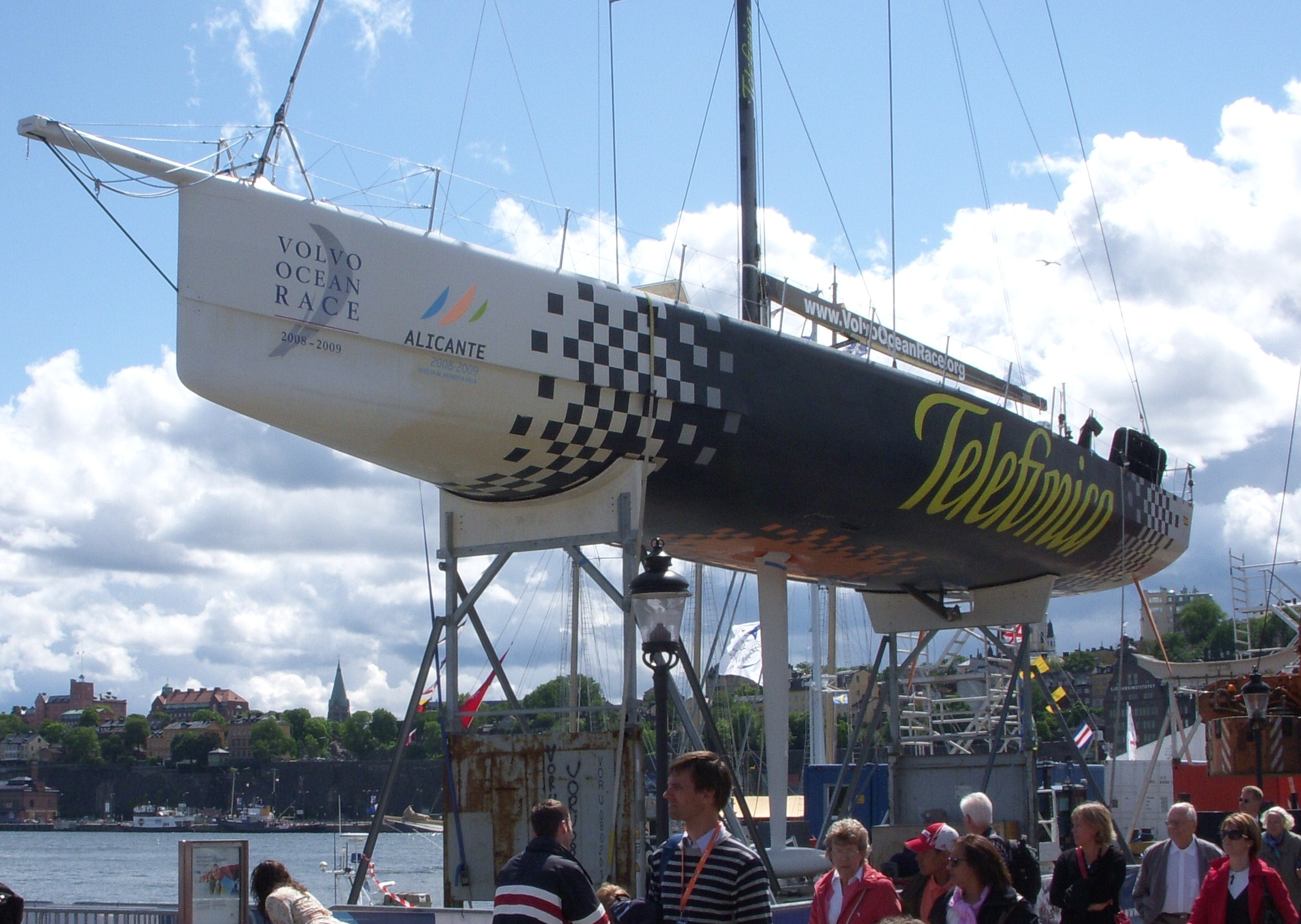 Skeppsbron vid Volvo Ocean Race, Stockholm Stopover, TELEFONICA